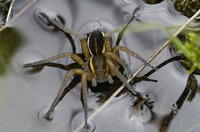 female Dolomedes fimbriatus from Commanster, Belgian High Ardennes .